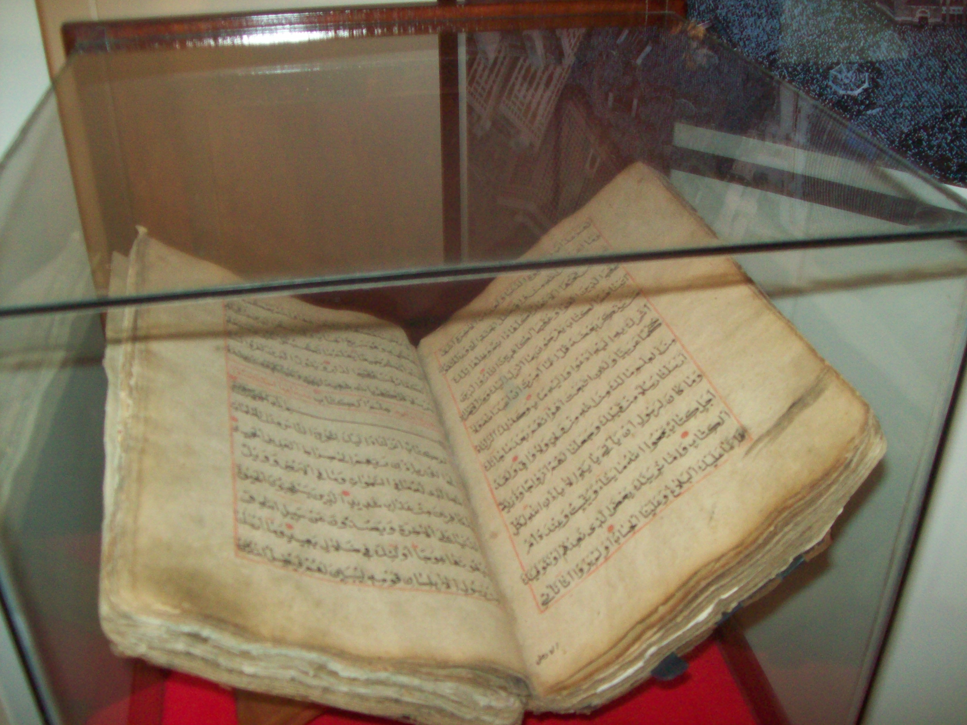 Reproducción del Sagrado Corán.